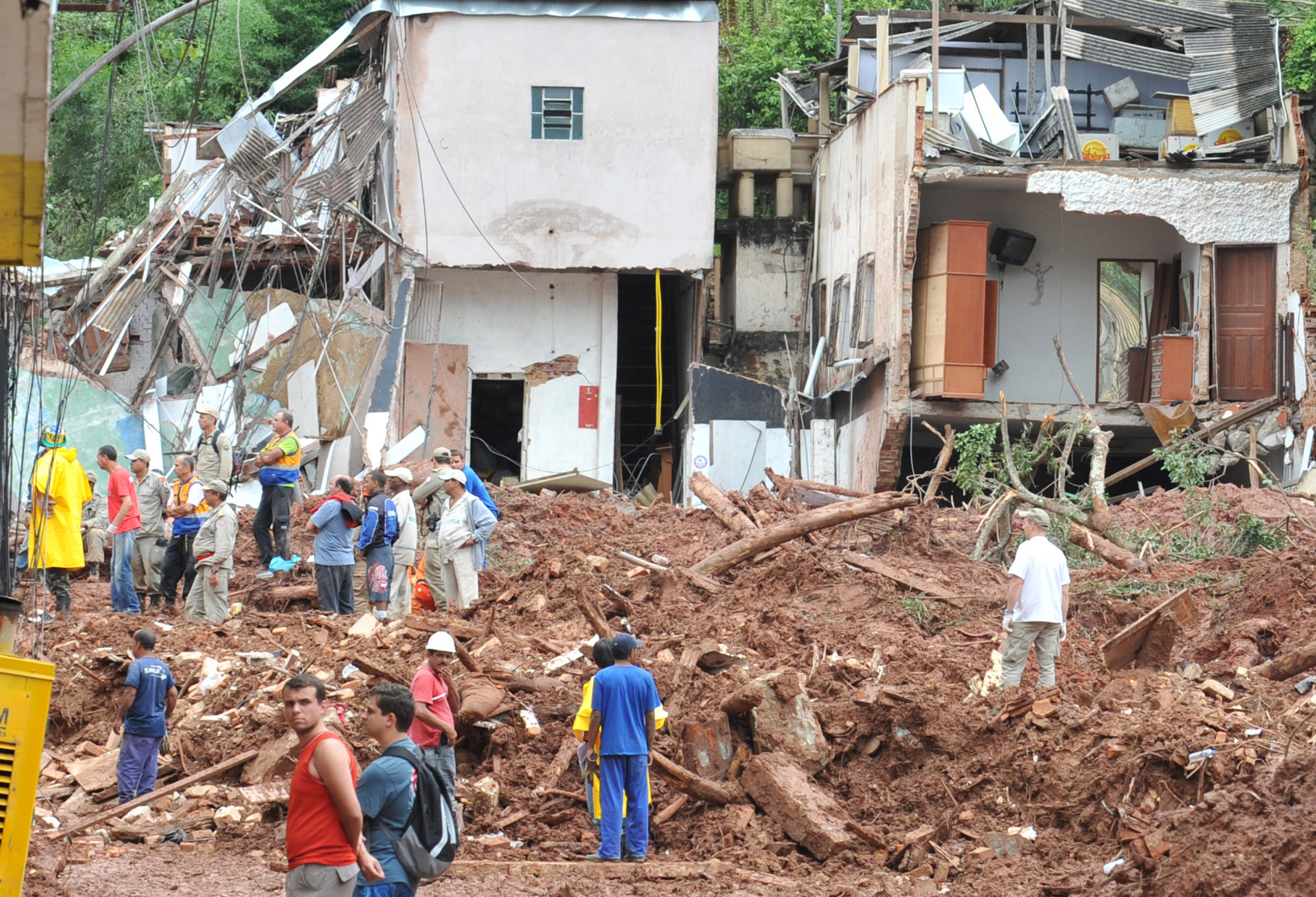 Nova Friburgo (RJ) - Áreas atingidas pelas chuvas, no município de Nova Friburgo, região serrana fluminense (Valter Campanato/ABr)